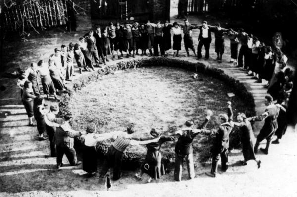 Danse d'un mouvement sioniste à Częstochowa, Pologne.